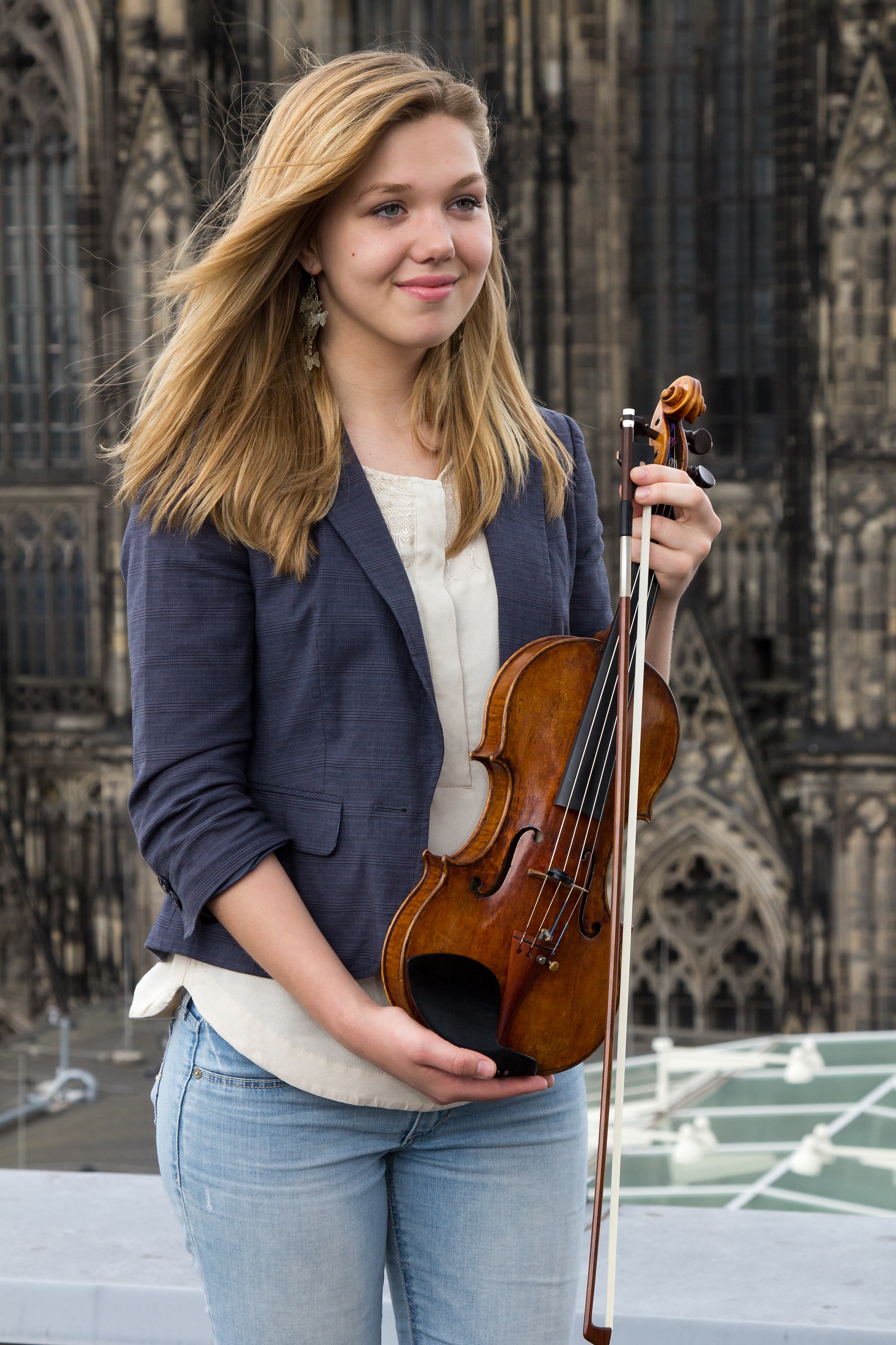 Eurovivions Young Musicians 2014, Teilnehmerin Judith Stapf auf dem Dach des WDR-Funkhauses